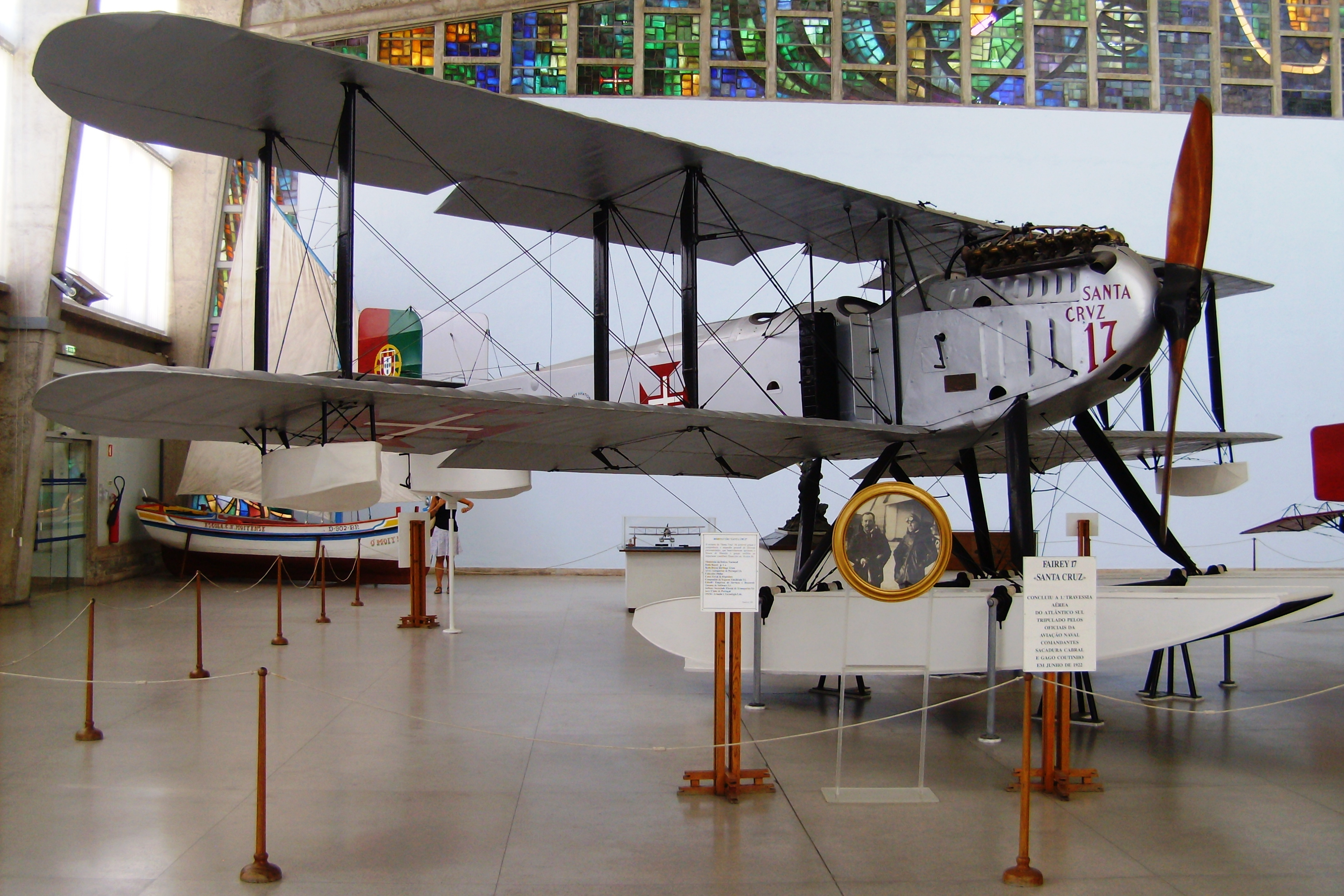 Museu de Marinha de Lisboa Native nameMuseu de Marinha de LisboaLocationLisbonEstablished1962WebsiteWebsite des Museu de Marinha (Portuguese)Authority control : Q1540177